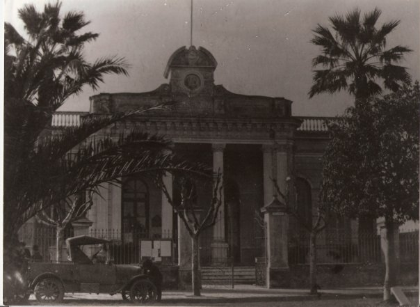 Viejo Palacio Municipal de Merlo, 1874-1939.